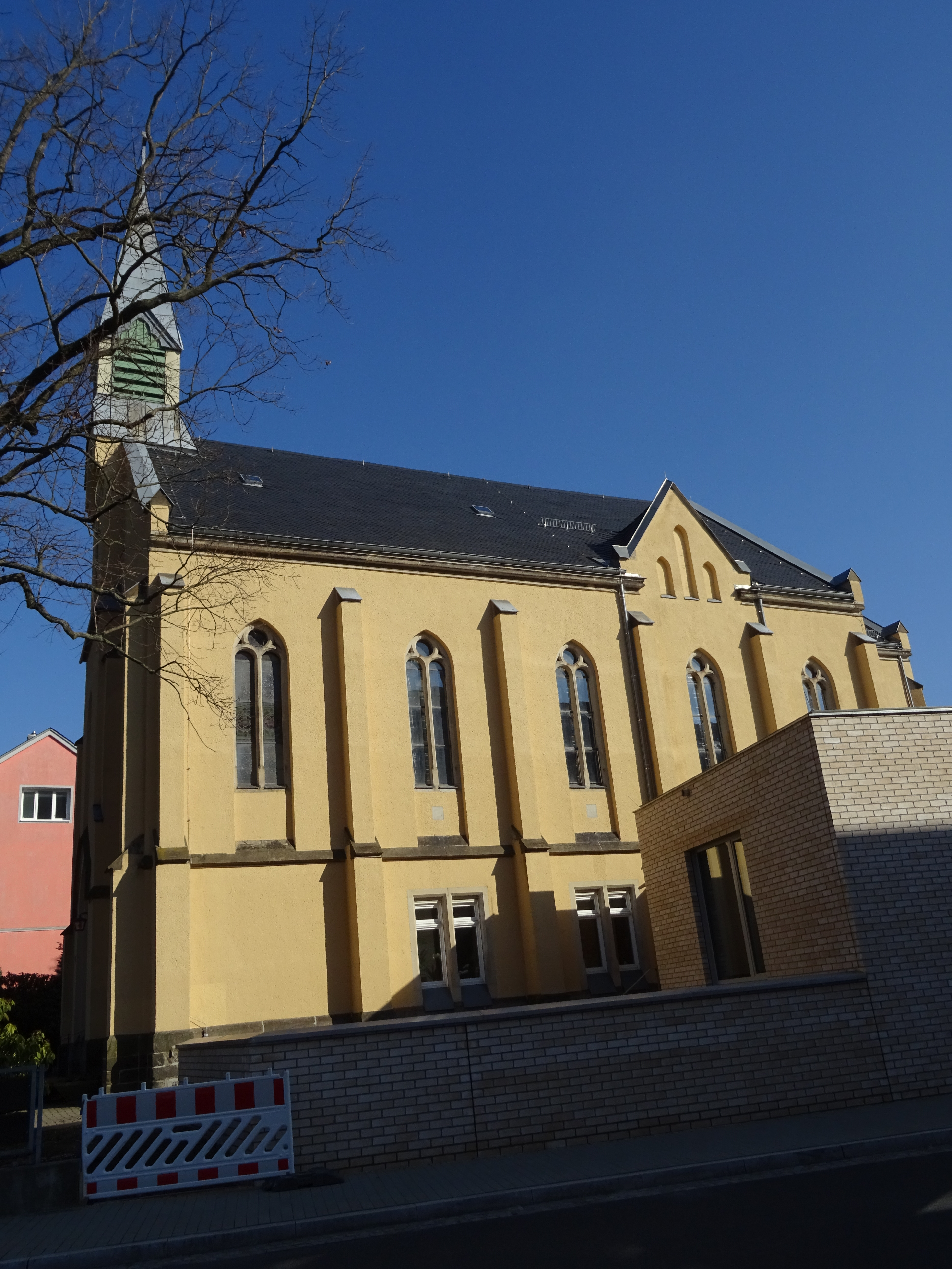 Katholische Kirche in Radeberg, erbaut von 1882 bis 1883 in neogotischen Stil. Derzeit finden Renovierungsarbeiten statt (21.03.2019)